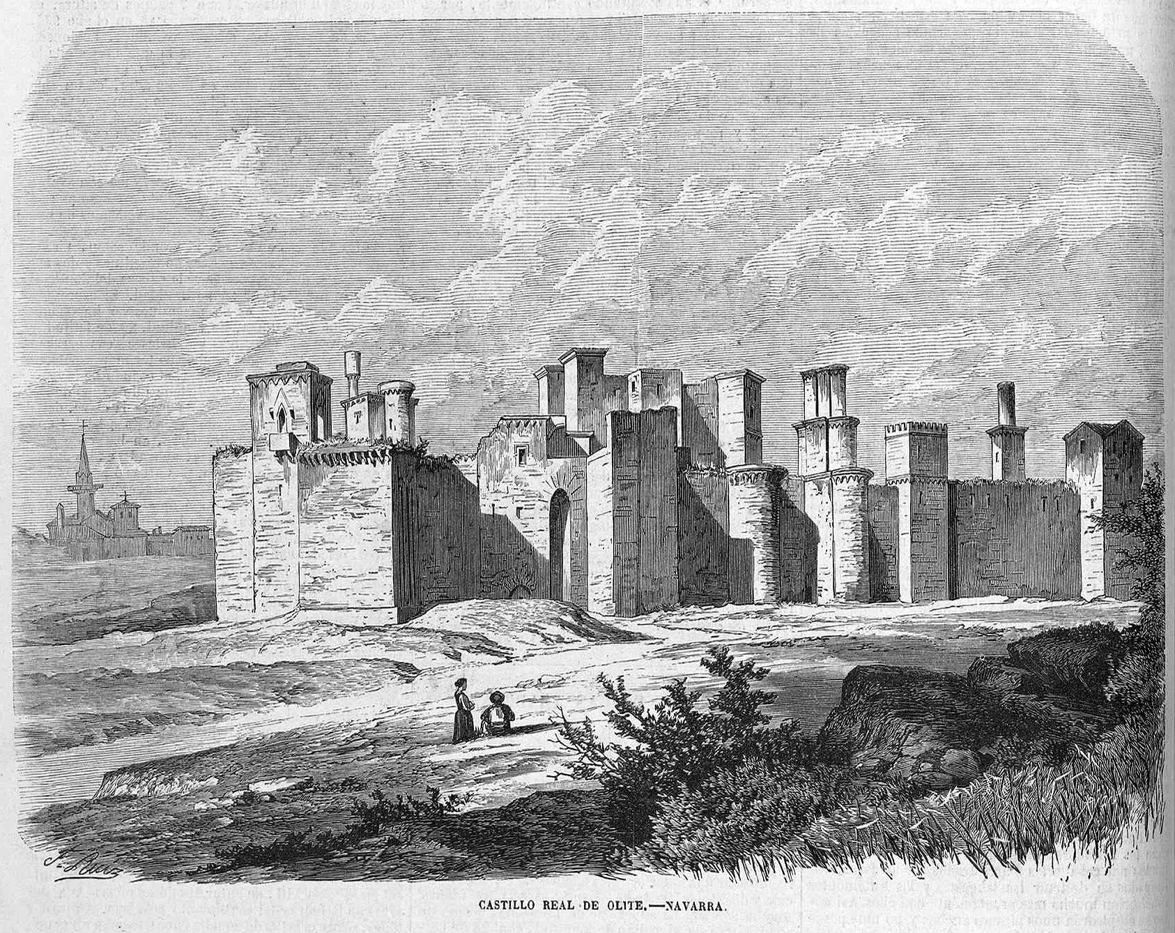 Castillo Real de Olite, en la revista española El Museo Universal.